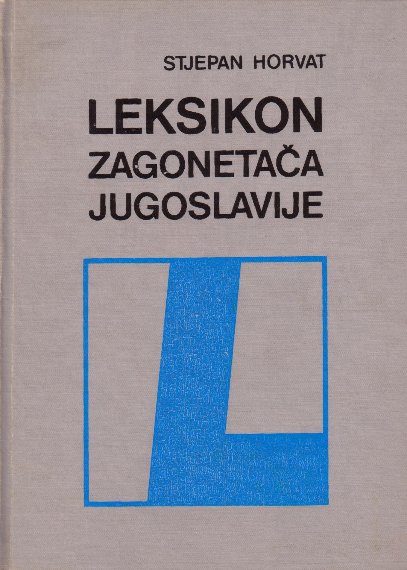 Leksikon zagonetača Jugoslavije, knjiga Stjepana Horvata